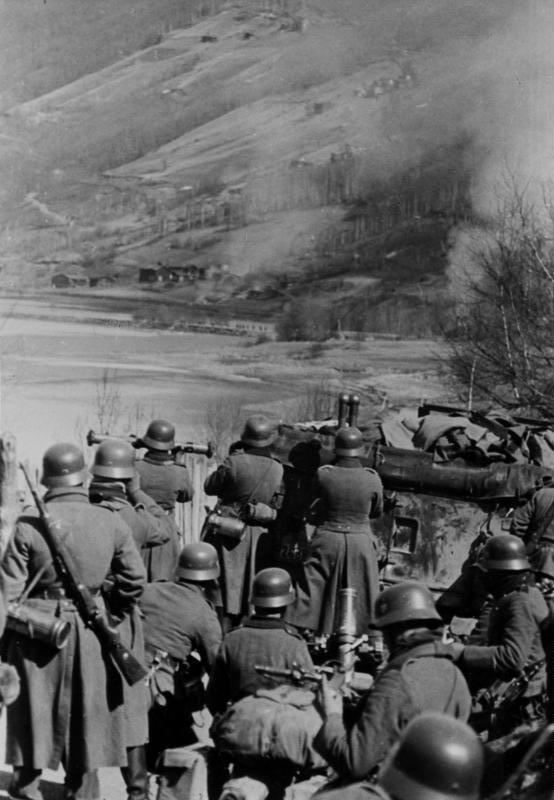 Heeresfilmstelle. Bildarchiv: Frontlinie Drontheim. Granatwerfer in Vorgehen gegen ein Widerstandsnest. Norwegen, bei Drontheim; 29.4.40